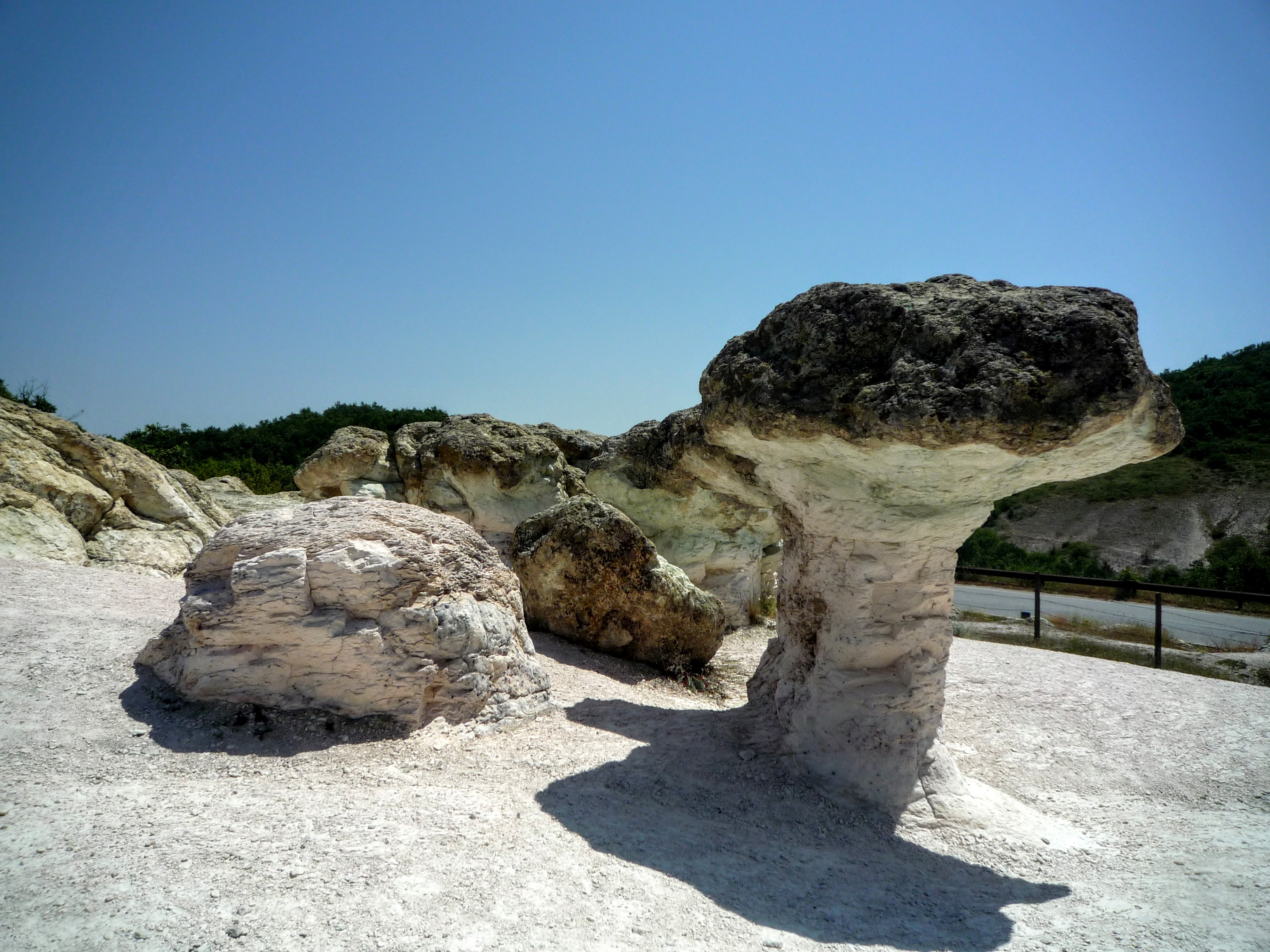 Скалните гъби,край село Бели пласт